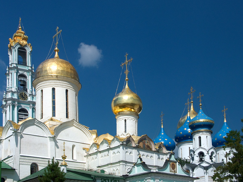 Ансамбль Троице-Сергиевской Лавры (Москва и Московская область, Сергиев Посад, Троице-Сергиева Лавра)